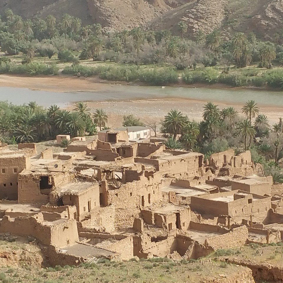 ce magnifique château est situé à à la tribu BNI YATTI, à une trentaine de kilomètres de la commune rurale de Bouanane au Sud-Est du Maroc